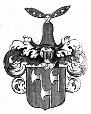 Wappen derer von El(c)kershausen genannt Klüppel.